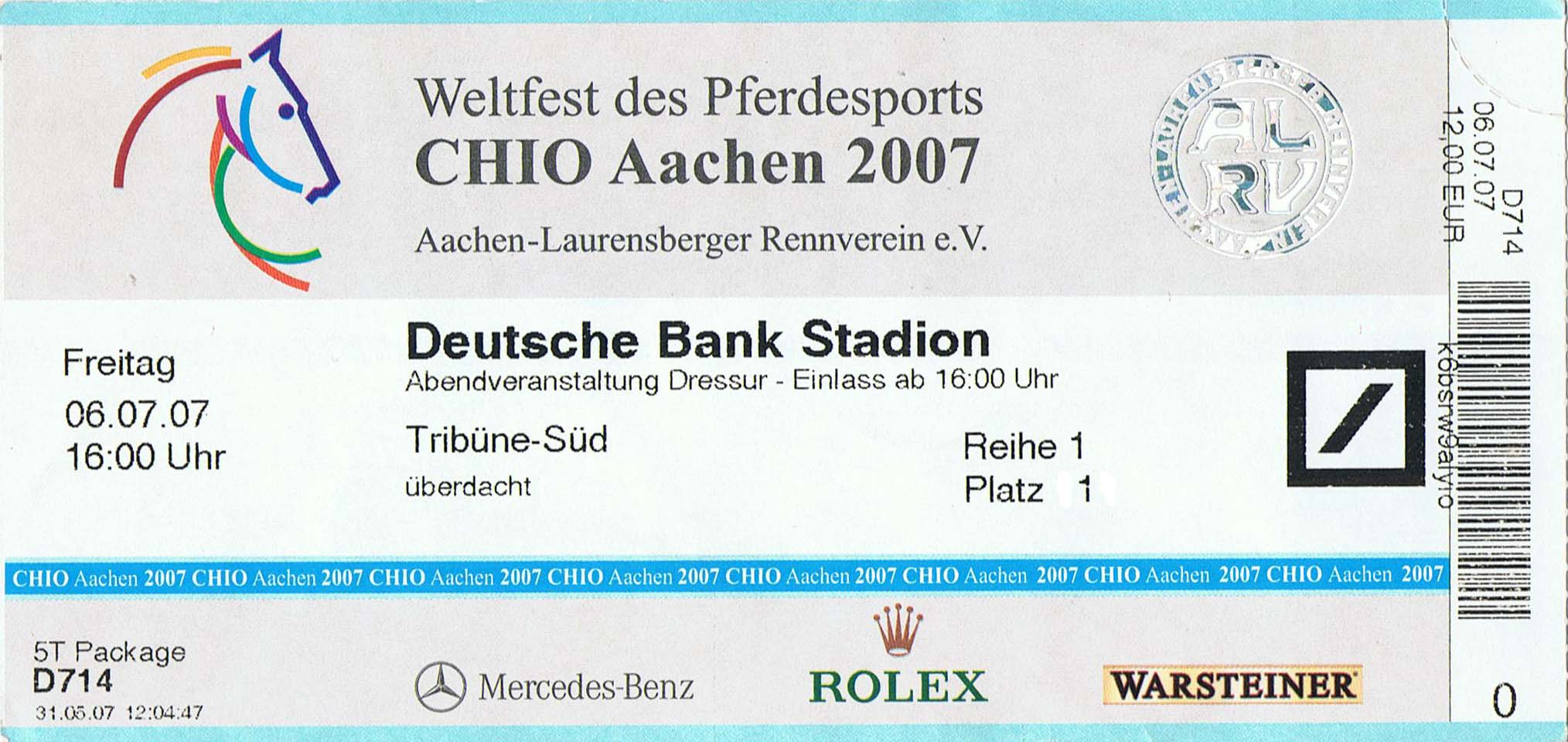 Scan einer Eintrittskarte zum Deutsche Bank Stadion